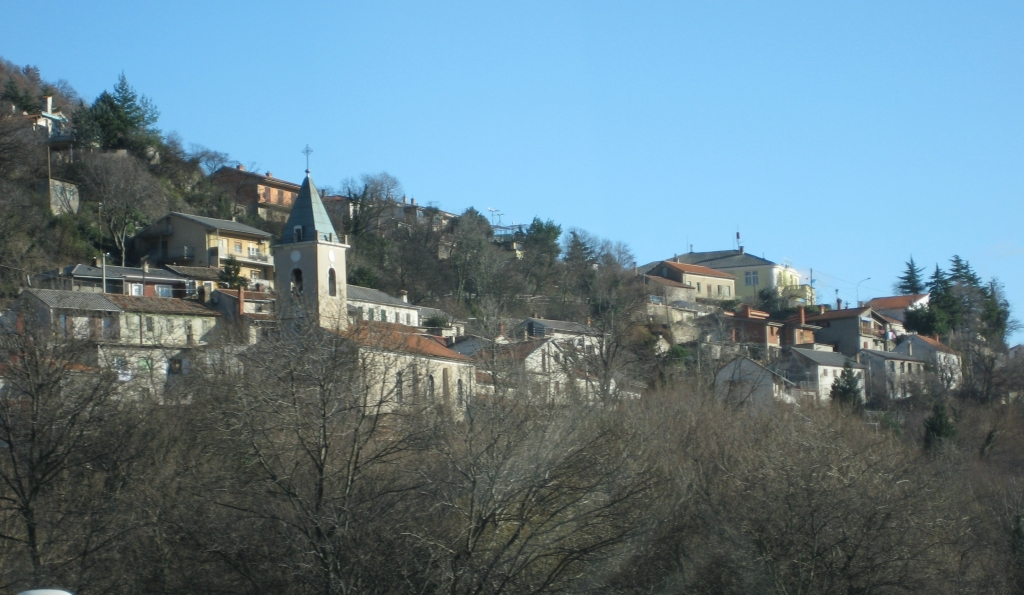 Naselje Draga kod Rijeke